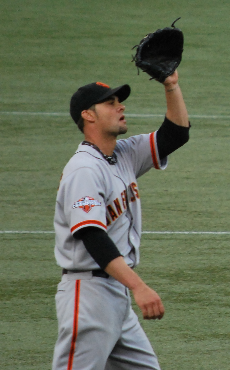 Ryan Vogelsong